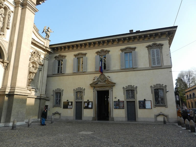 Milano - Conservatorio Giuseppe Verdi